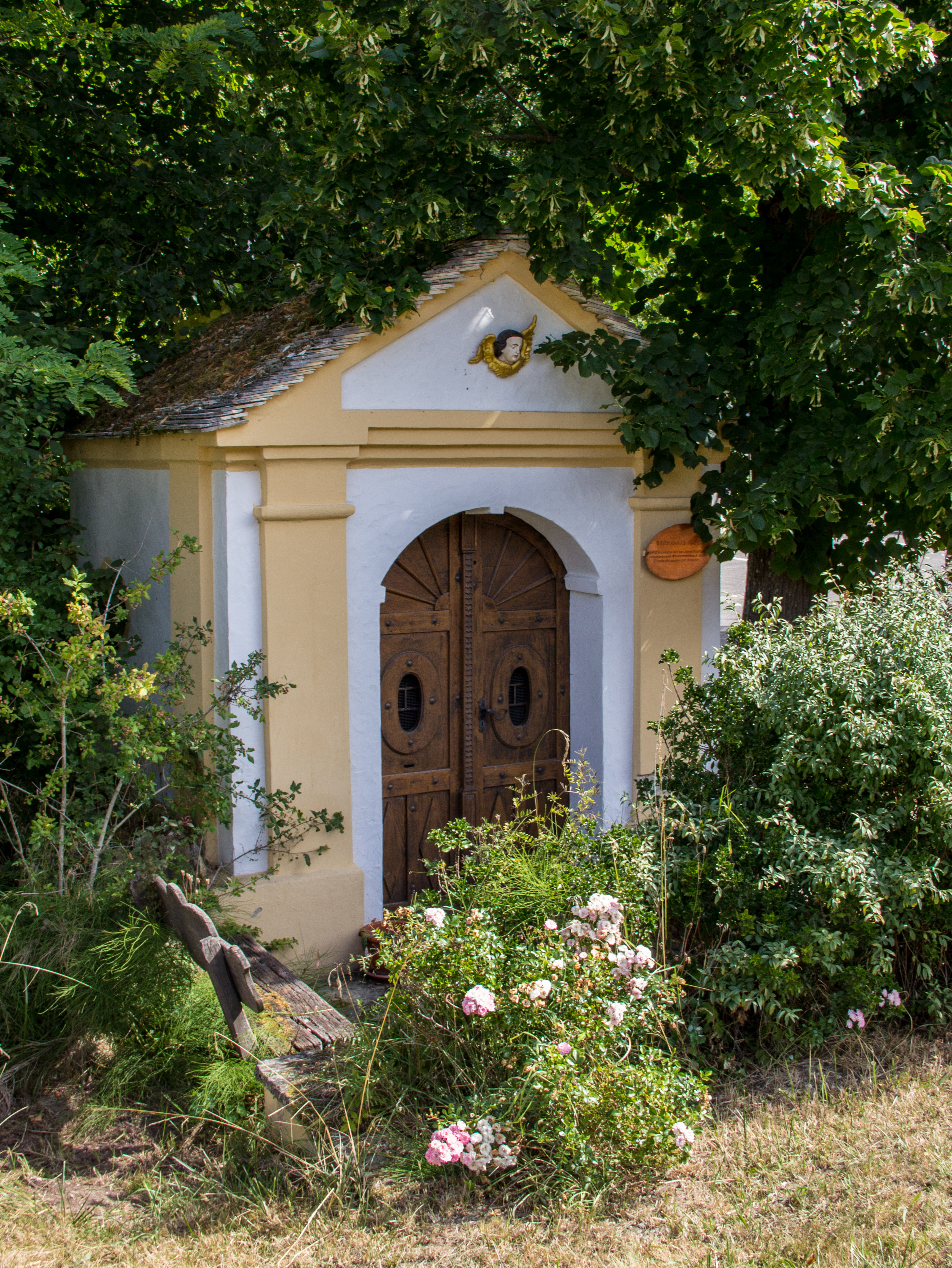 Wegkapelle, Essing